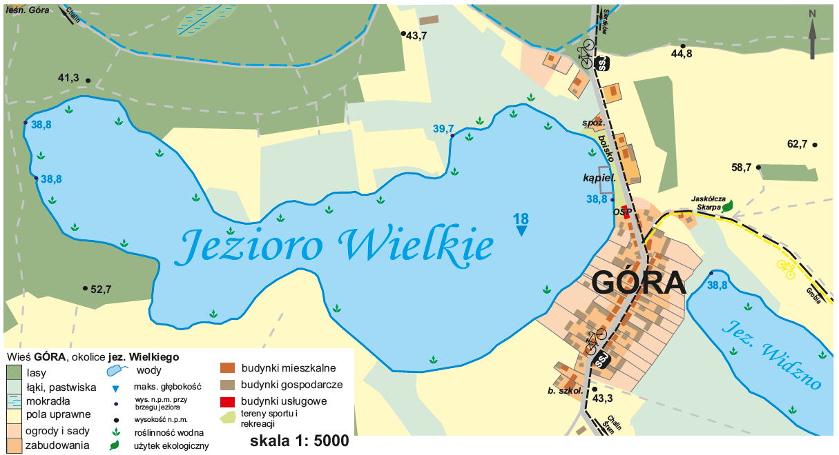 Okolice jez. Wielkiego i Góry